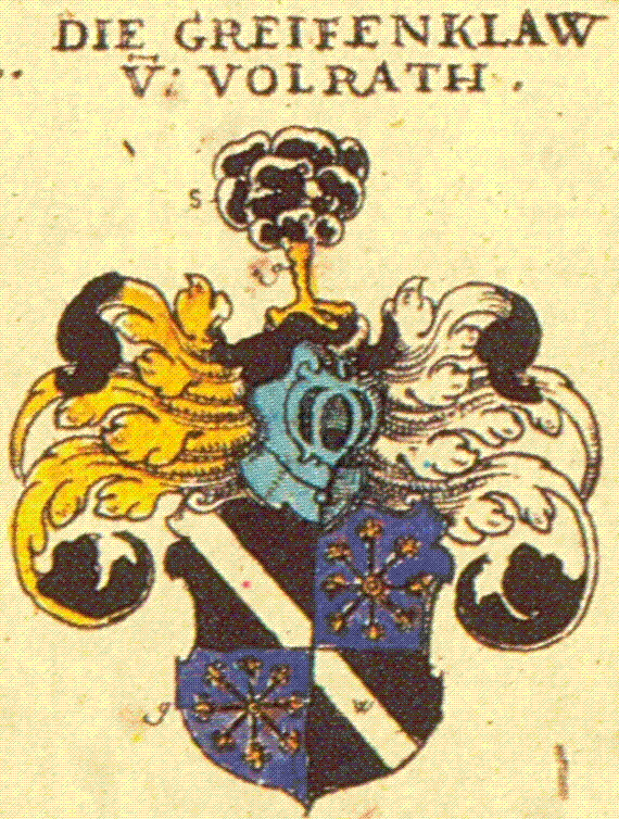 Wappen der Familie Greiffenclau-Vollraths nach Siebmachers Wappenbuch